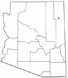 Burnsiden kylä Arizonan kartalla.